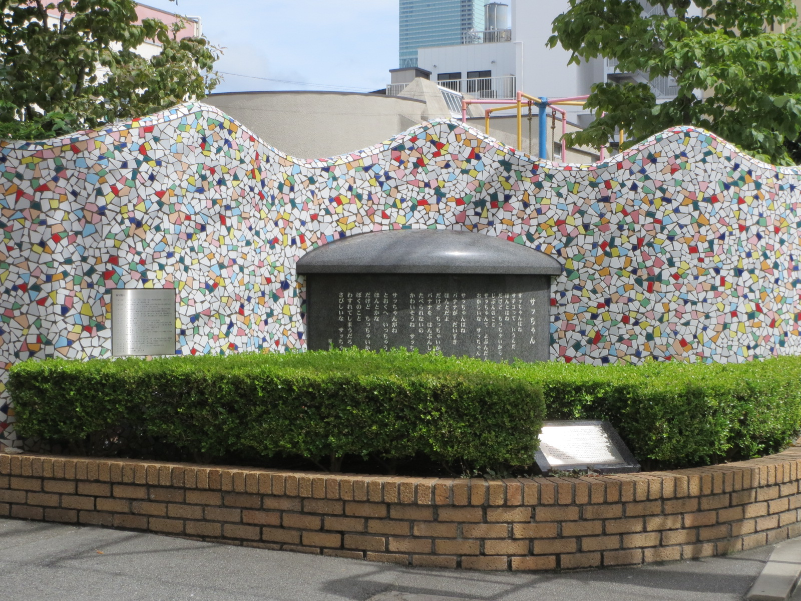 童謡発祥とされる場所の歌碑 Canon IXY 3